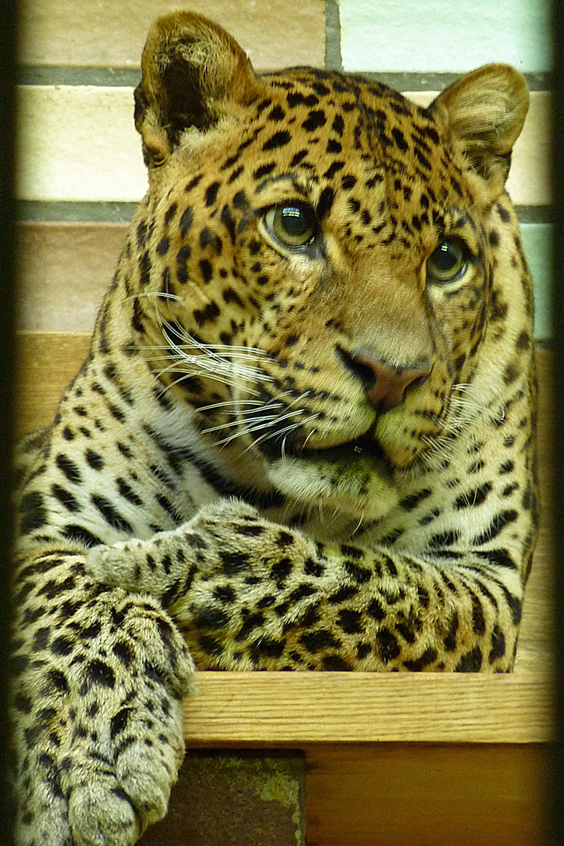 Männlicher Java-Leopard (Panthera pardus melas) namens "Wuppi" im Alfred-Brehm-Haus des Tierparks Berlin-Friedrichsfelde. Geboren im Jahr 1994 in Wuppertal. Hat im Berliner Tierpark mit dem Weibchen "Shinta" zwei am 16. Januar 2012 geborene Jungtiere gezeugt: ein männliches ("Arjuna") und ein weibliches ("Sri Kandi"). Neben einem weiteren Männchen im Berliner Zoologischen Garten handelt es sich um die derzeit einzigen Exemplare dieser bedrohten Art außerhalb von Indonesien.